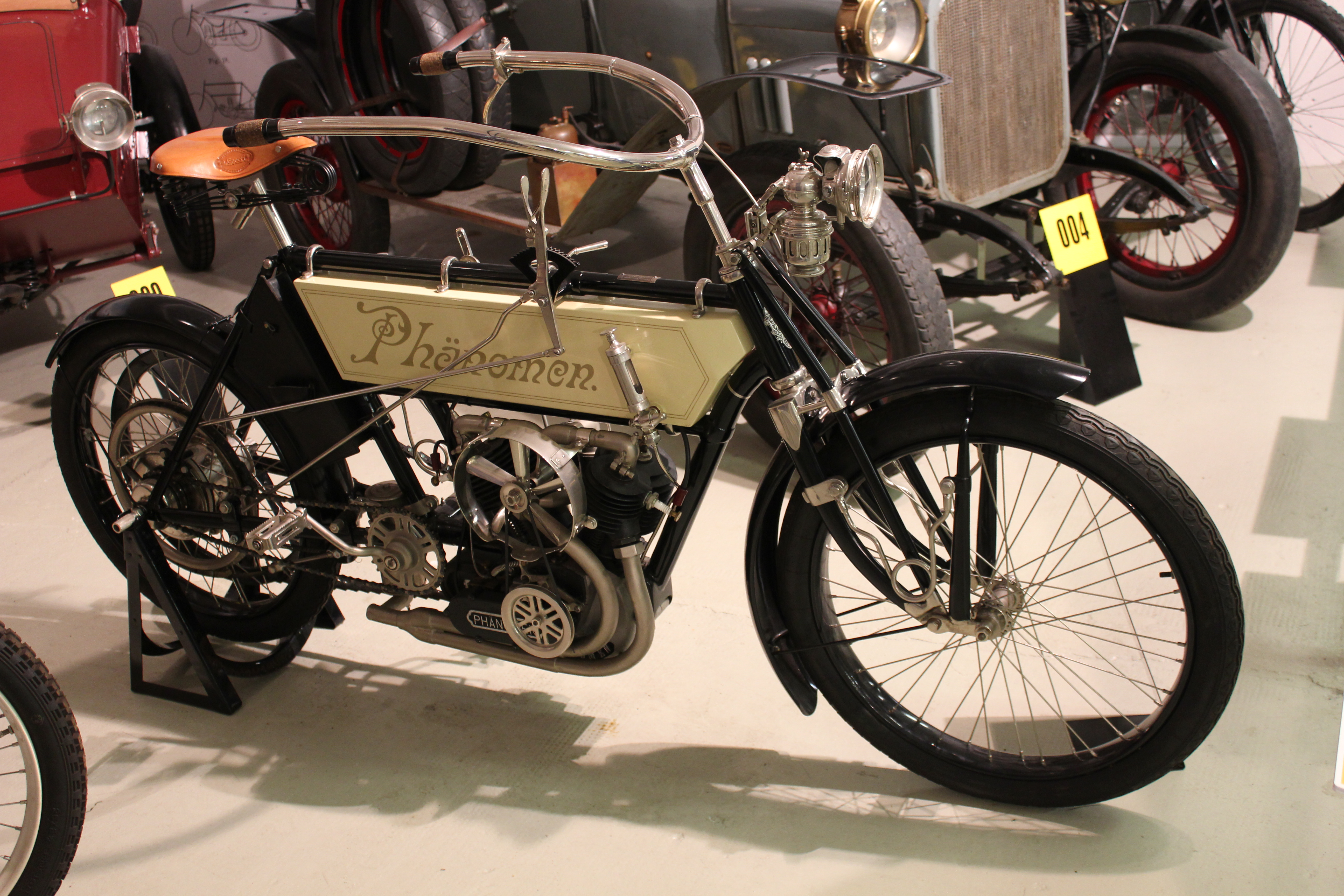 Phänomen-Motorrad, Exponat des Museums für sächsische Fahrzeuge.